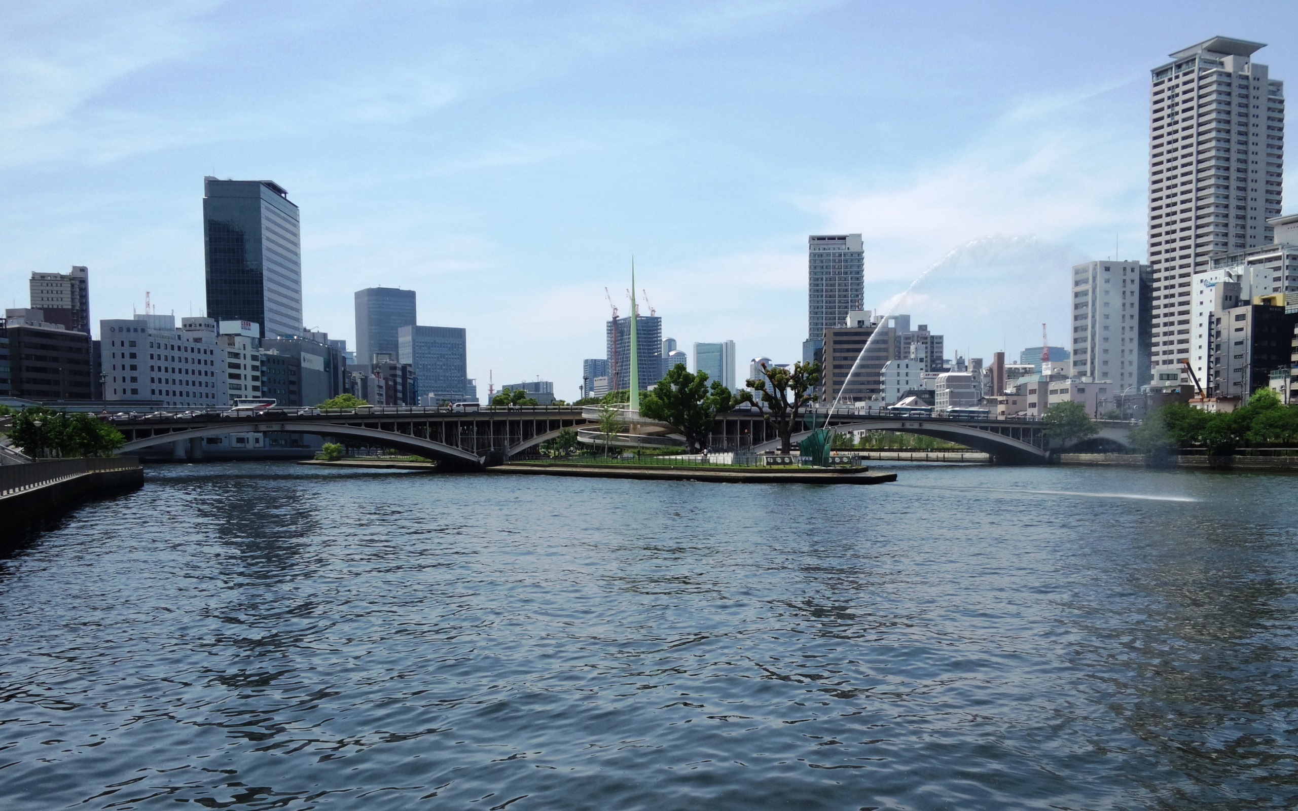 天神橋と噴水